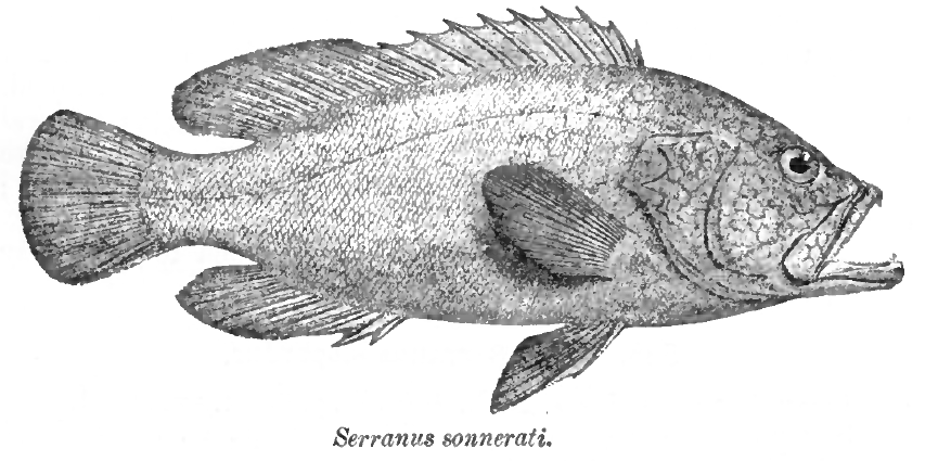 Serranus sonnerati = Cephalopholis sonnerati (Valenciennes, 1828)